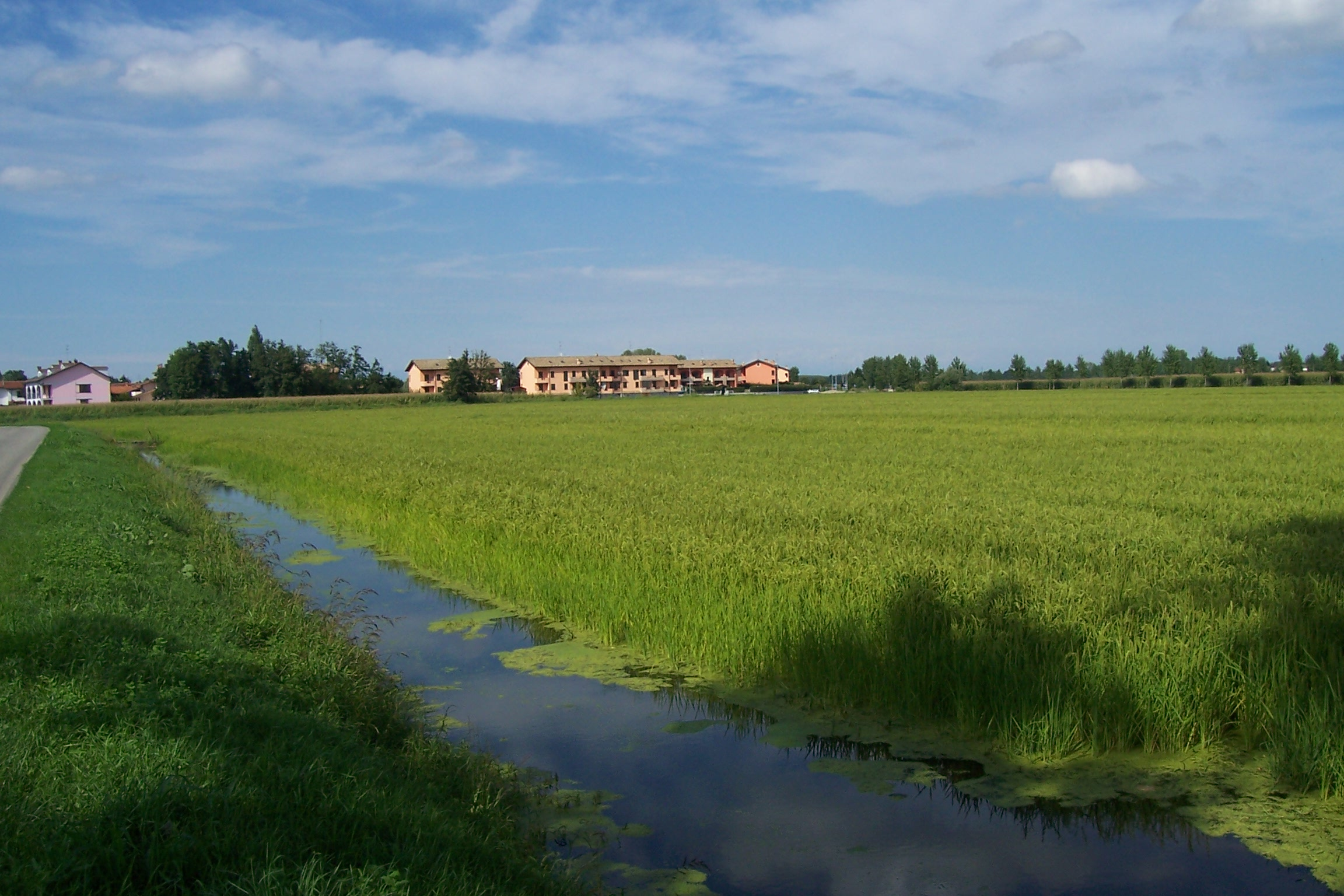 Risaie a Bornasco (Pavia)